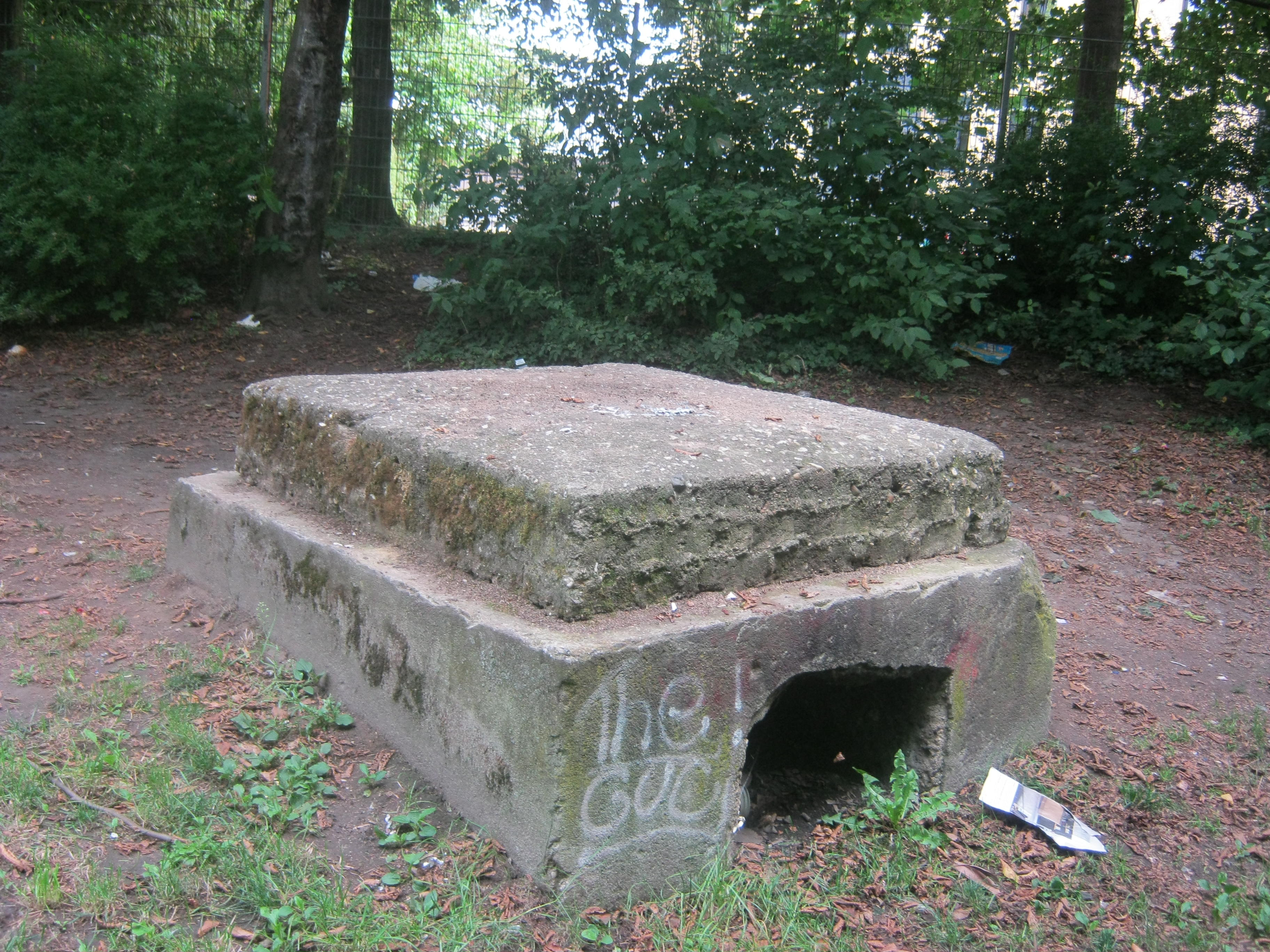 Bunker Ostschule